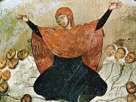 Плачот на Рахела, фреска од Марков Манастир